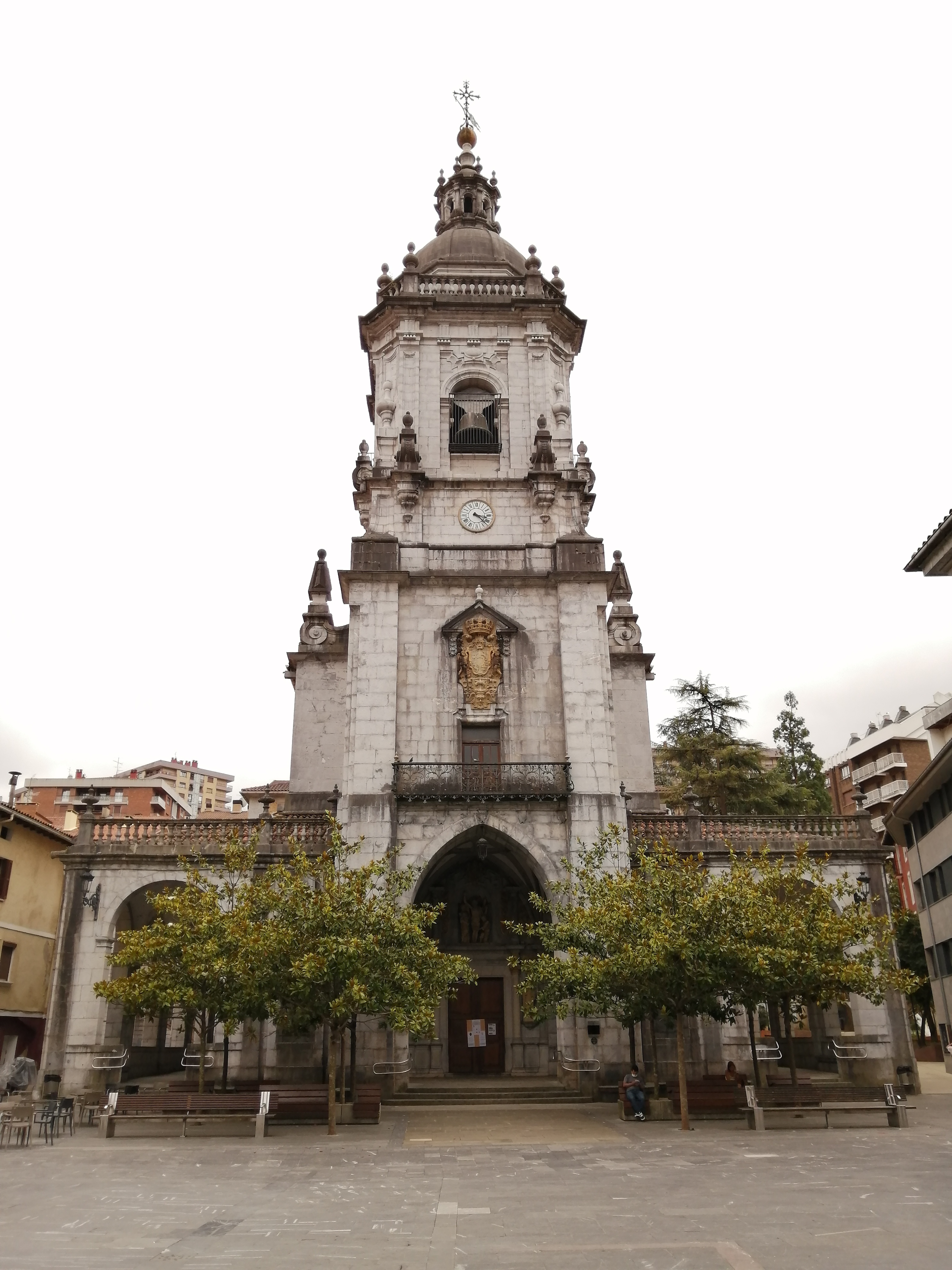 San Bartolome eliza, Elgoibar.